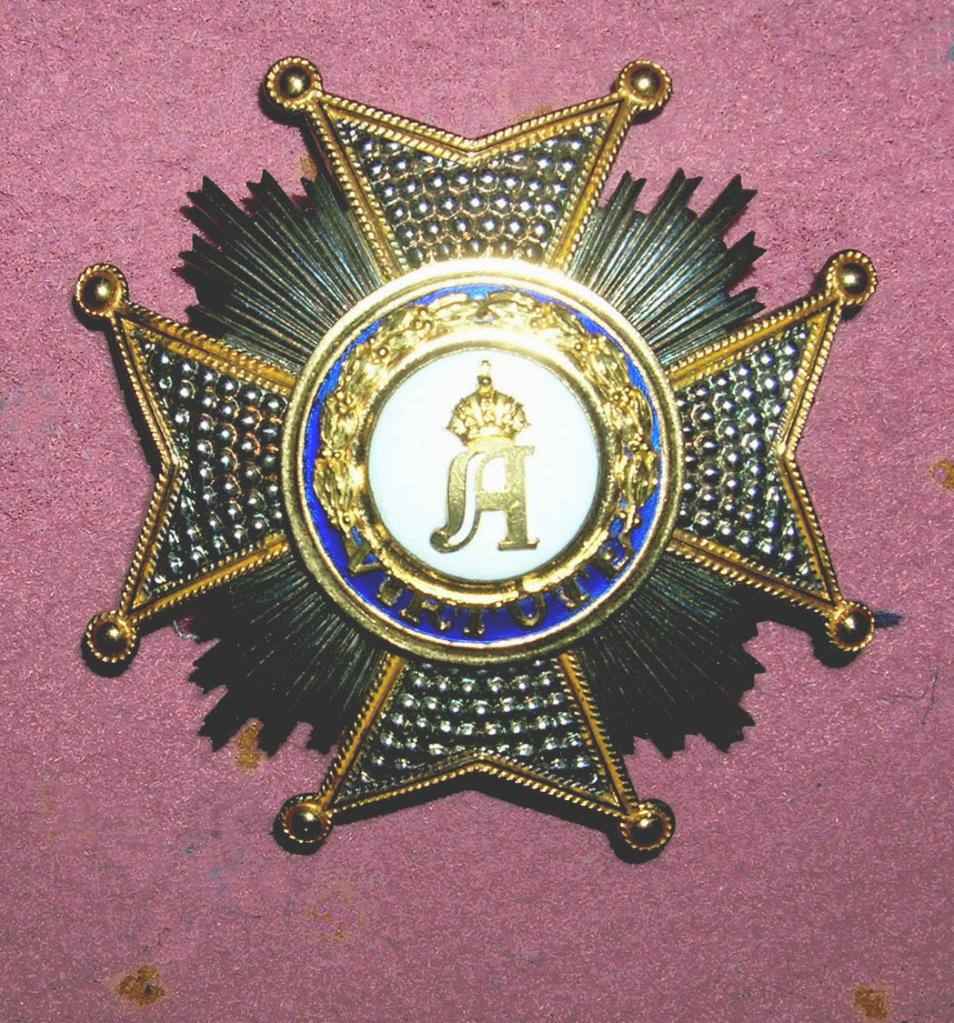 Commandeur-Halsband vum Ordre Adolphe de Nassau